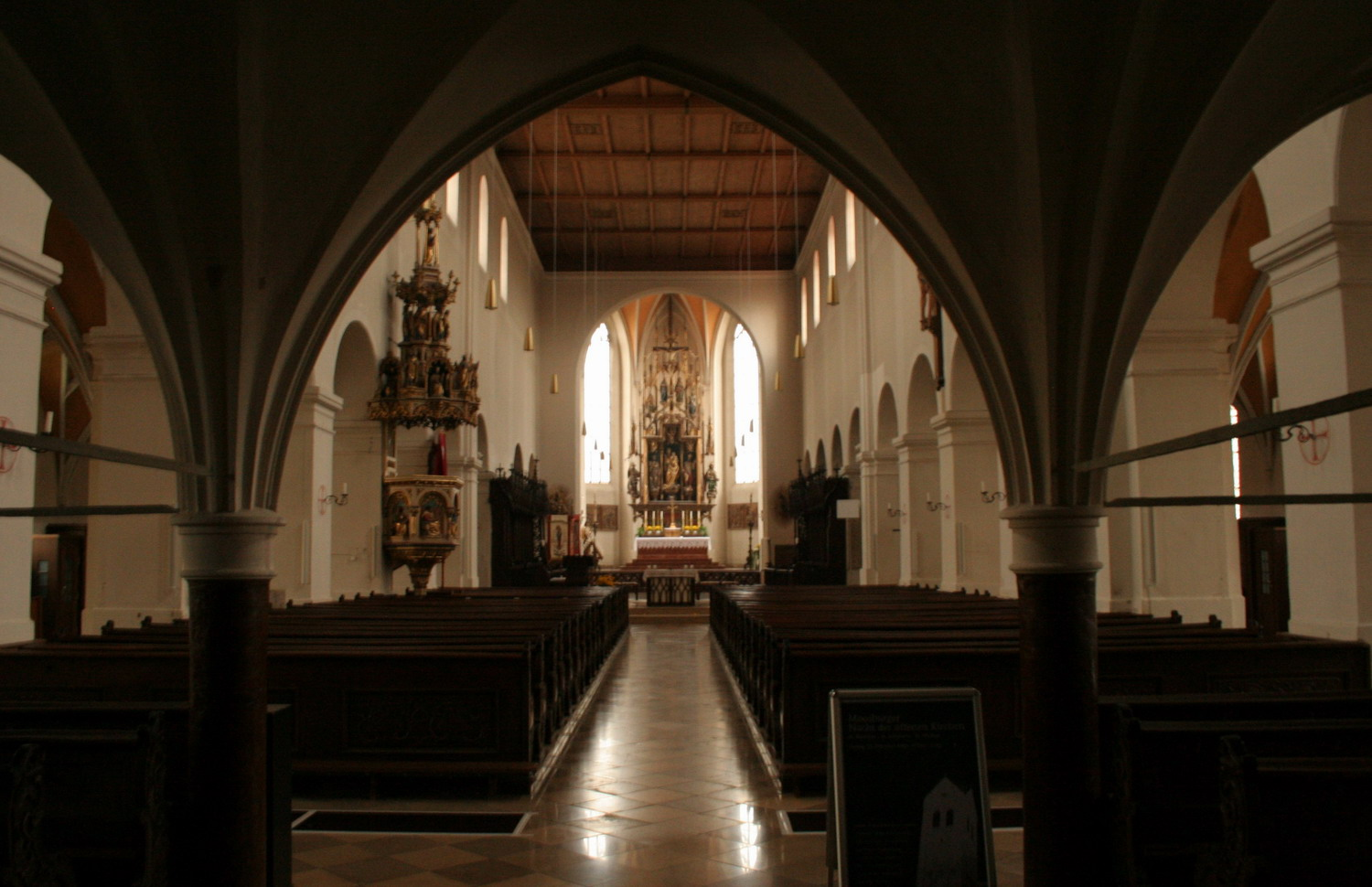 Kastulusmünster Innenraum